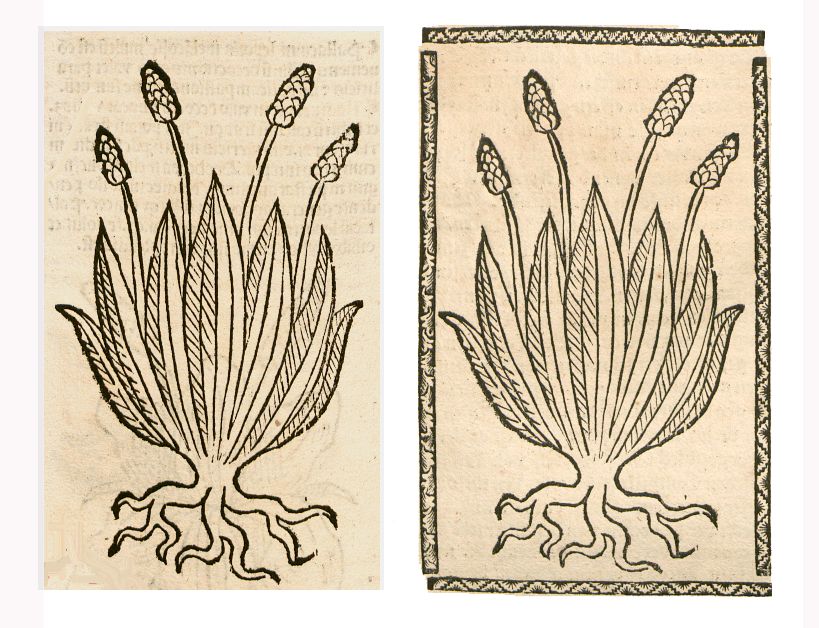 Abbildung vonː Spitz Wegrich (Plantago lanceolata)